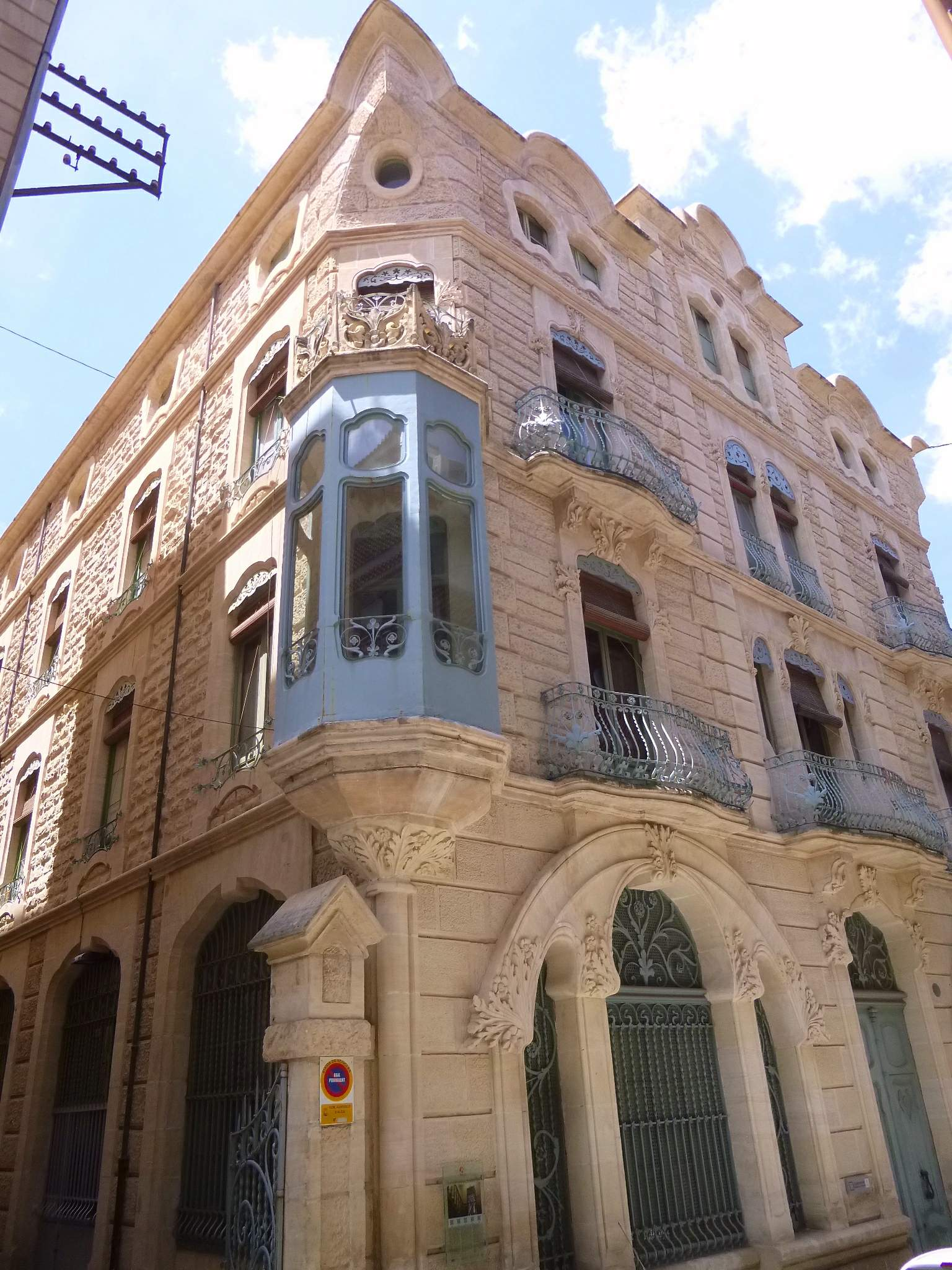 Alcoy (Alicante) - Conservatorio de Música y Danza Joan Cantó